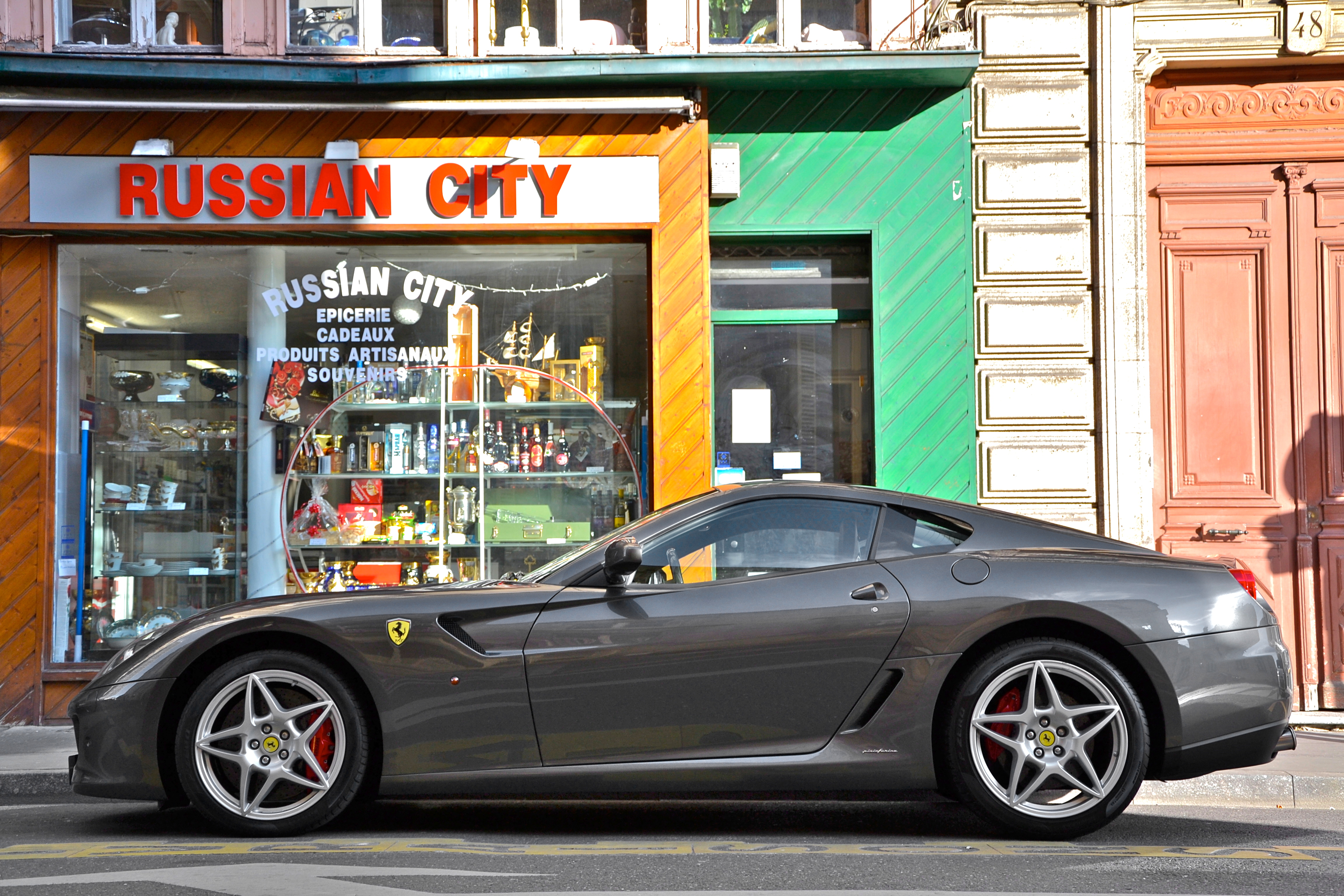 Ferrari 599 GTB Fiorano